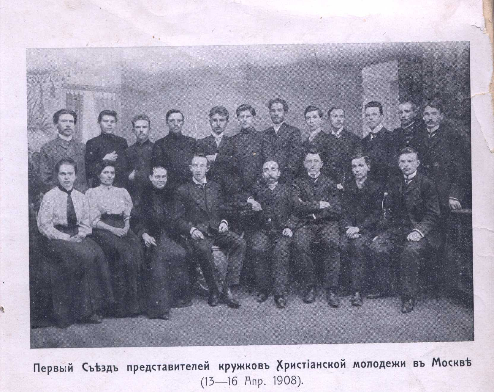 Первый съезд представителей кружков Христианской молодежи в Москве, 1908 год.